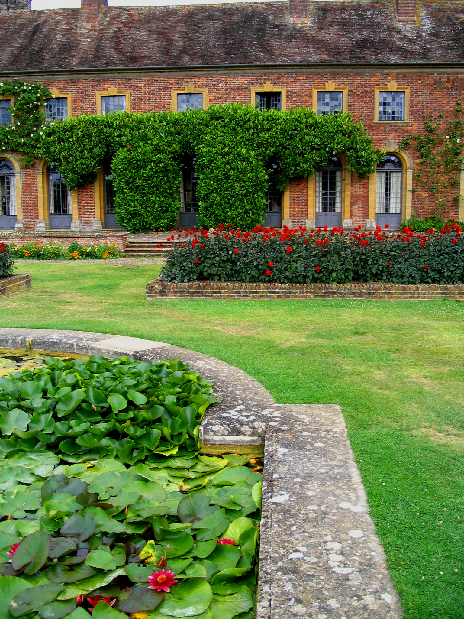 Manoir de Barrington Court - Angleterre Propriété du National Trust auteur: P Charpiat - 2006